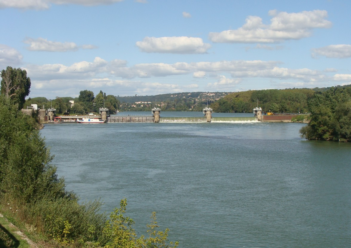 Le barrage de Rochetaillée-sur-Saône vu du pont de Couzon-au-Mont-d'Or (Rhône).